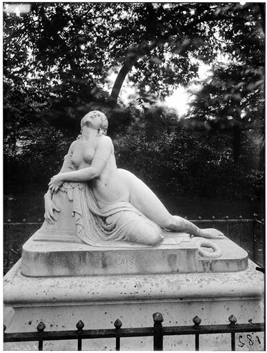 Statue de la Mort de Lais